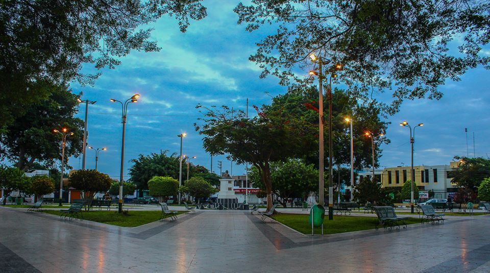 Plaza de Armas de Casma.